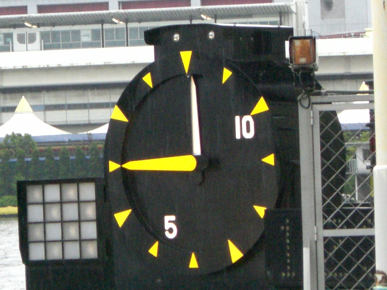 KYOTEI at Suminoe OSAKA